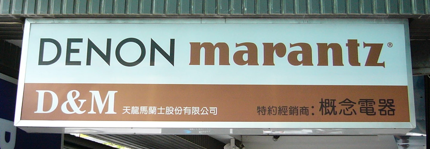 台灣天龍馬蘭士特約經銷商橫式招牌